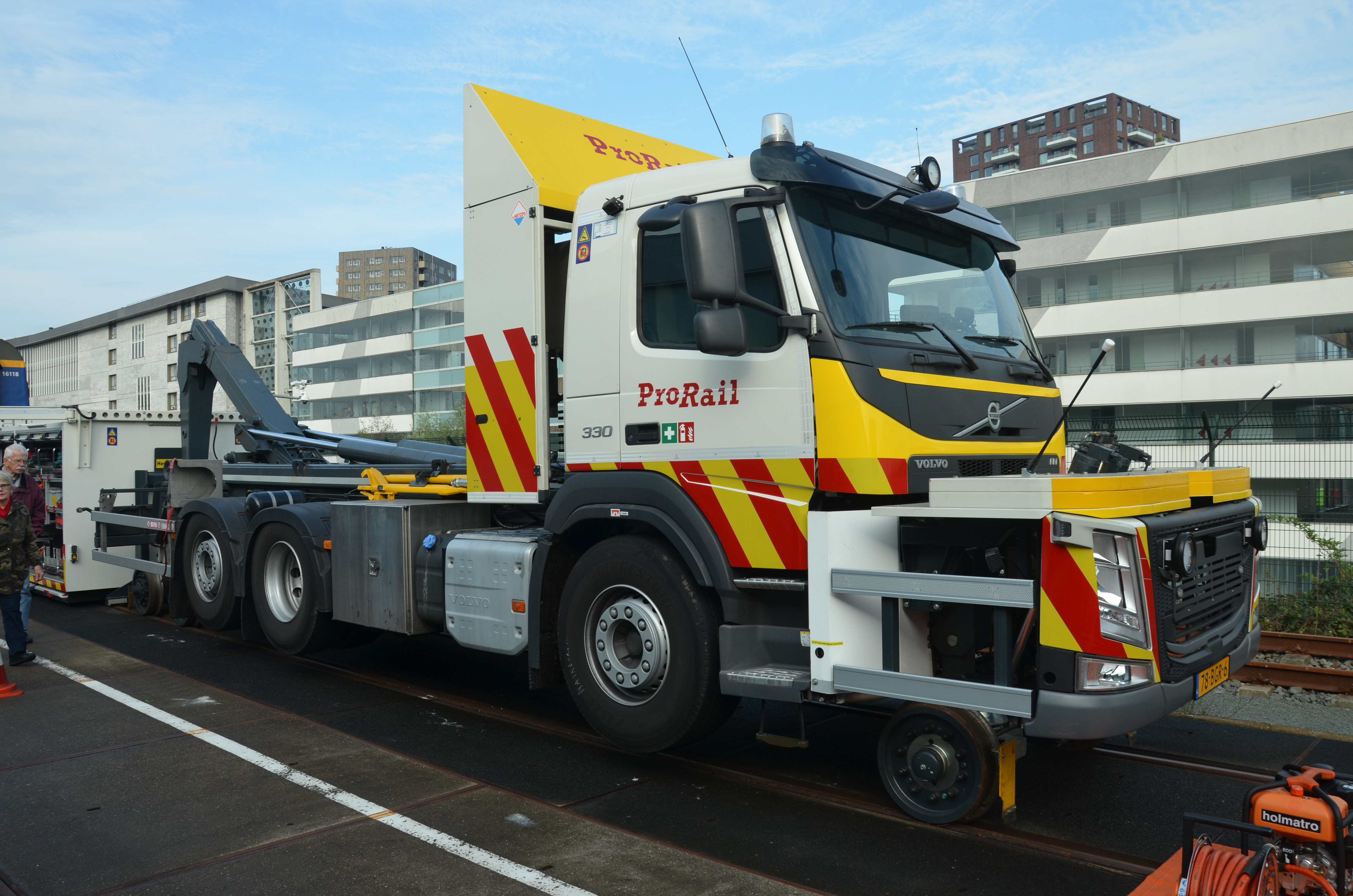 Een werkvoertuig van Prorail op de werkplaats in Watergraafsmeer.